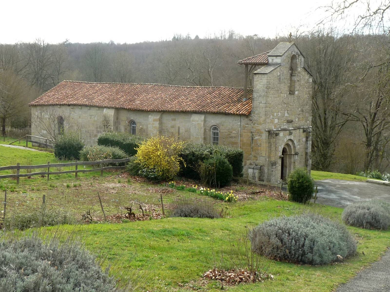 église de St-Adjutory, Charente, France